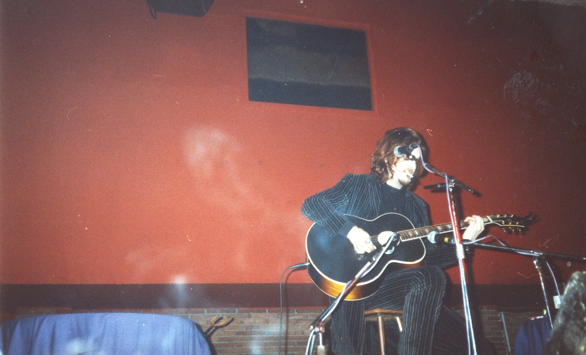 Tyla